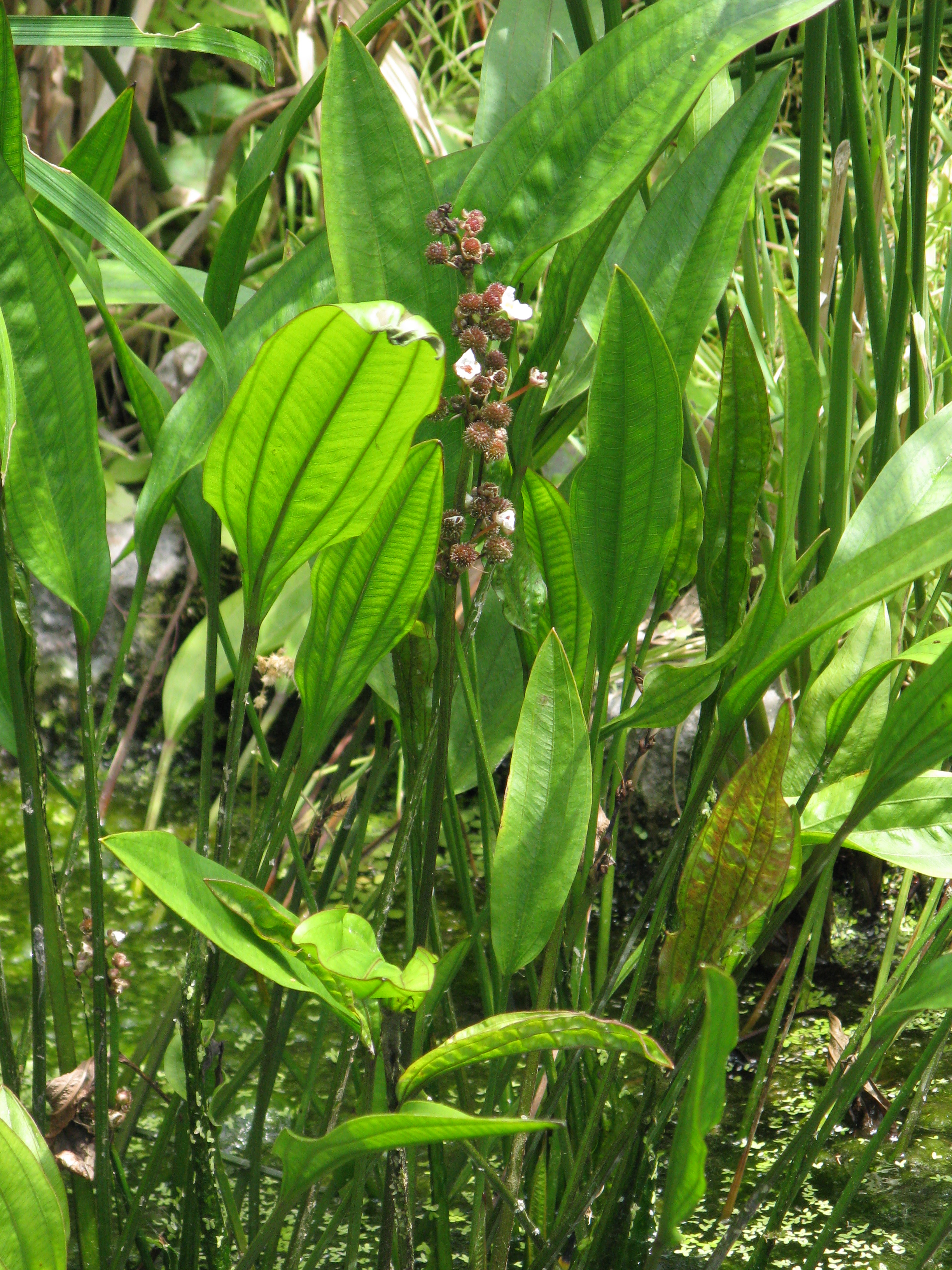 Scientific name Echinodorus paniculatus